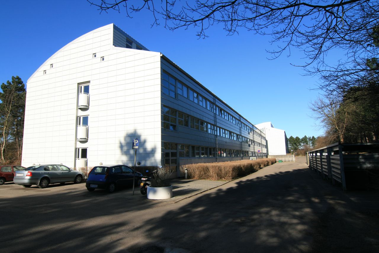 Billede af POP Kollegiet